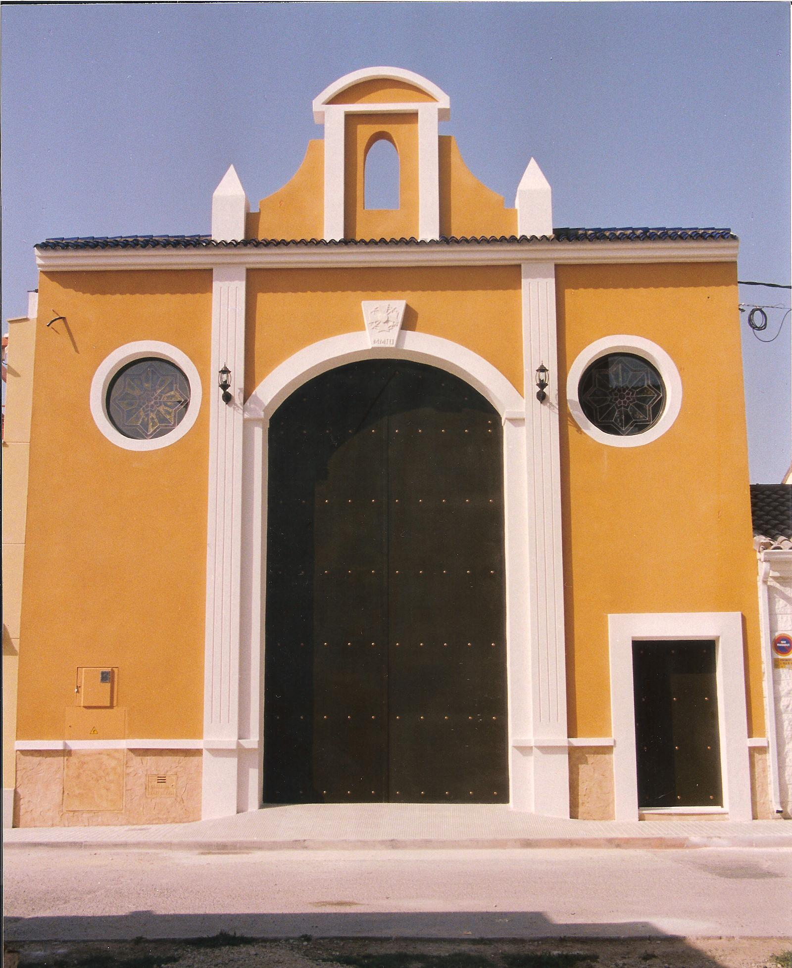 Fachada de la Casa de Hermandad en la localidad de Aspe.